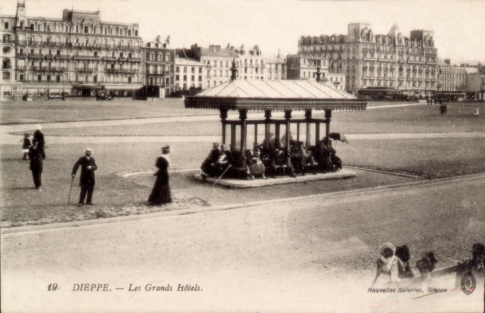 Front de mer de Dieppe de l'hotel Métropole à l'hotel Royal, Dieppe. Avant 1914.